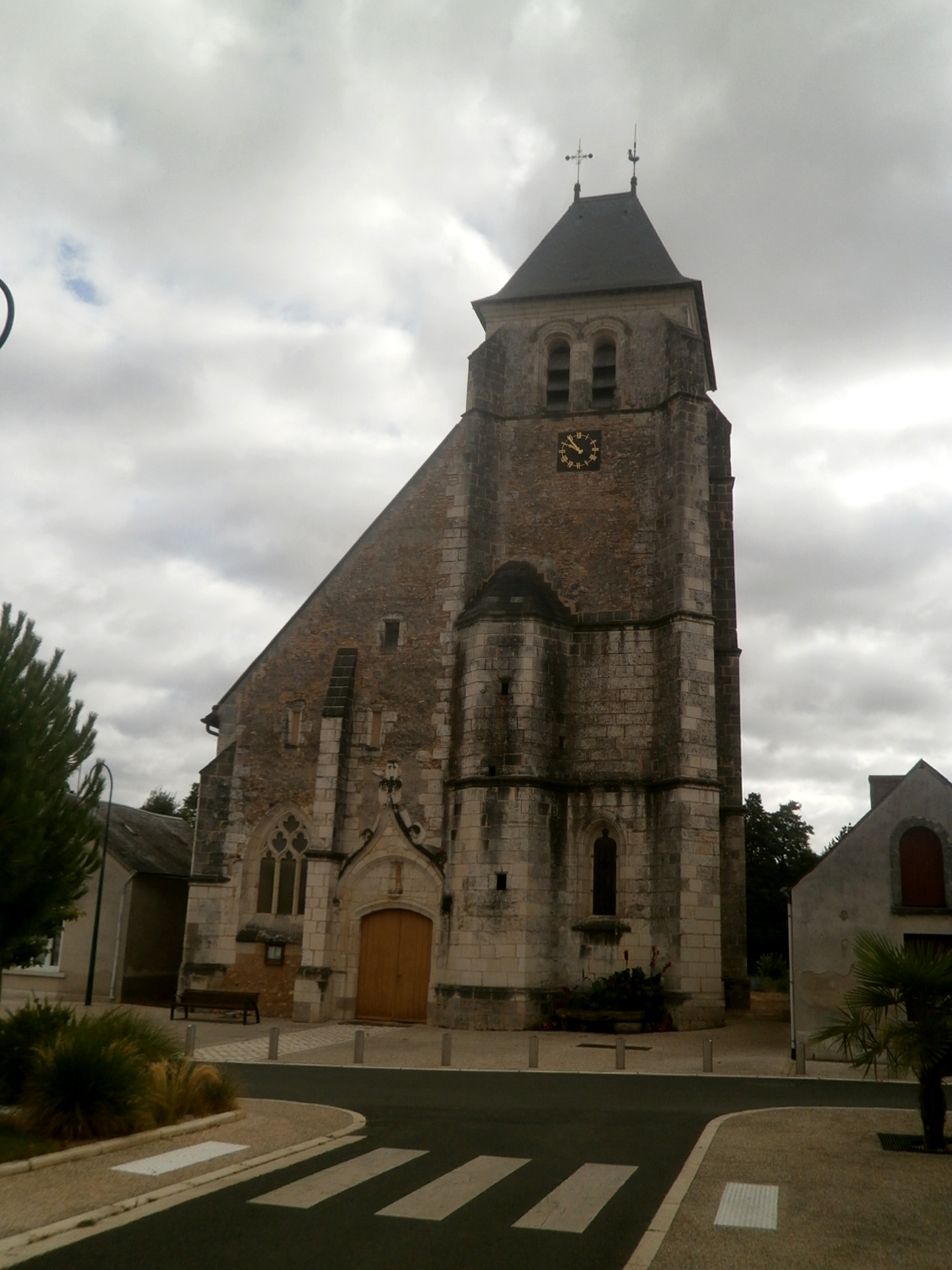 L'église